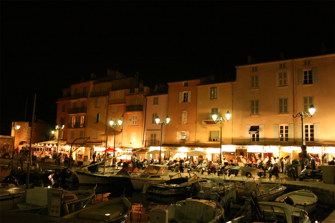 Le port de Saint-Tropez de nuit